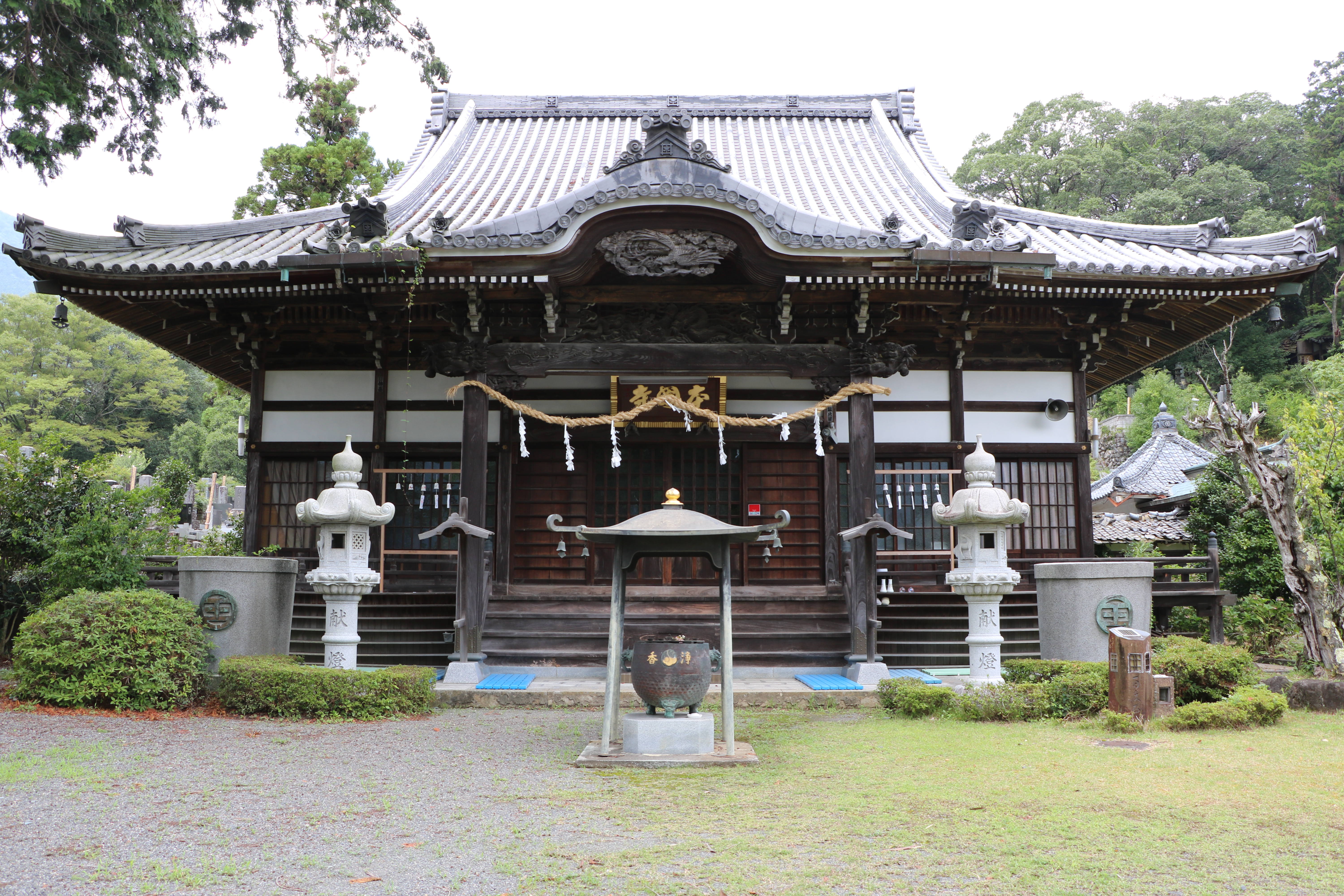 本国寺本堂（山梨県南巨摩郡身延町）